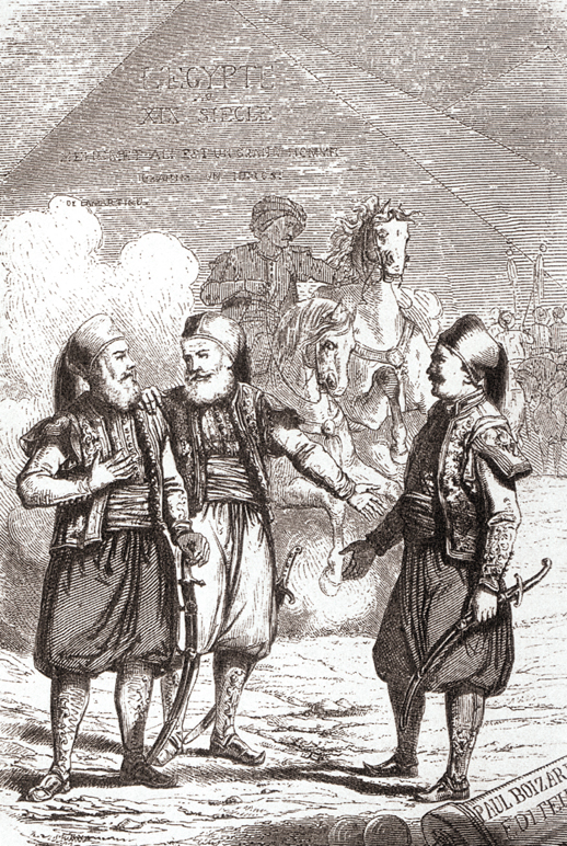 Ibrahim Pachá con su padre Mehmet Ali y el coronel Sève